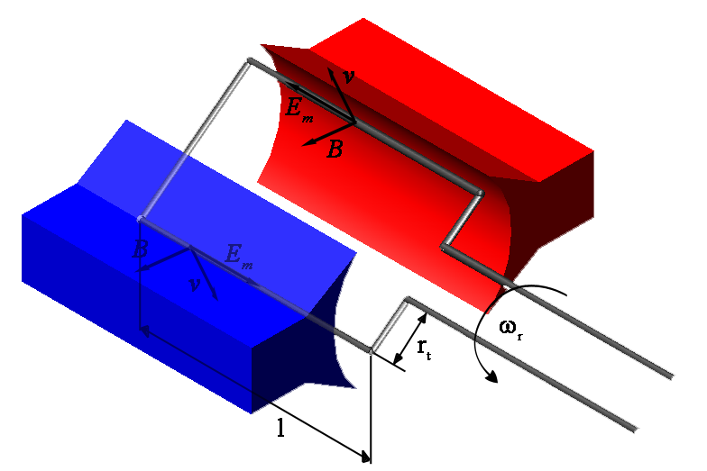 autore: Len zuò descrizione: schema di funzionamento di una macchina elettrica rotante